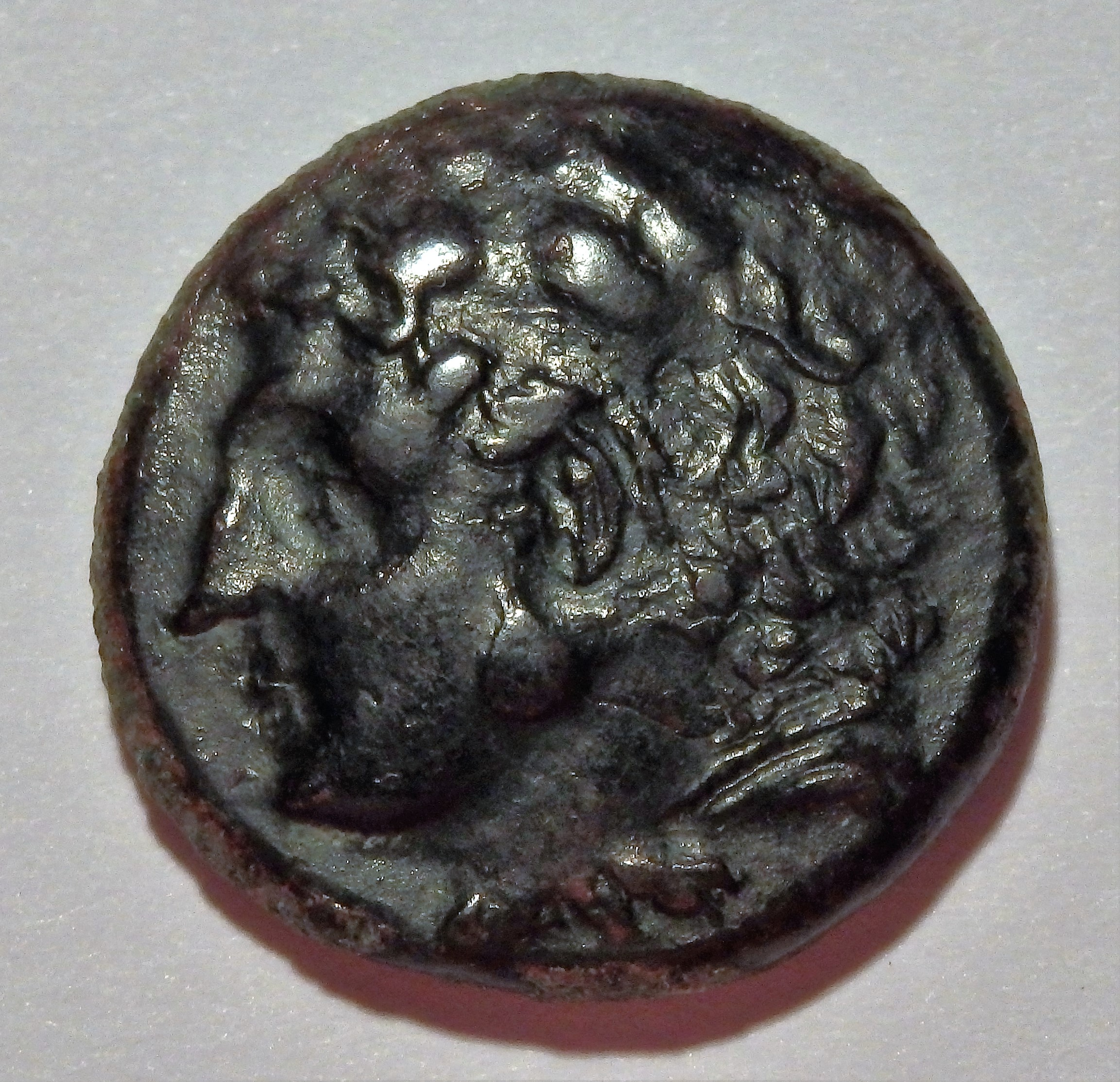 Bronzemünze aus Syrakus, Kopf des Herakles, 278-276 v. Chr.